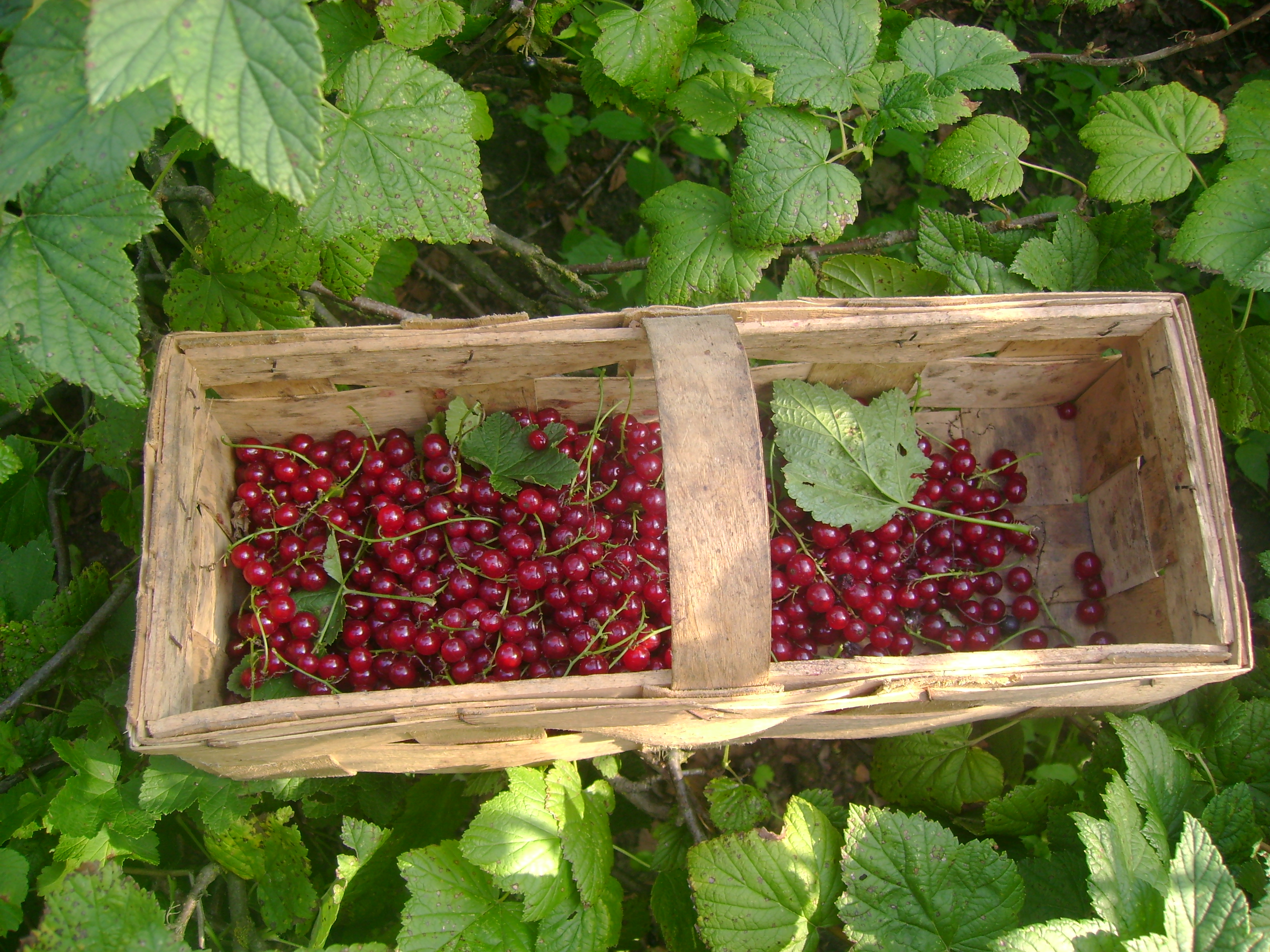 Porzeczki